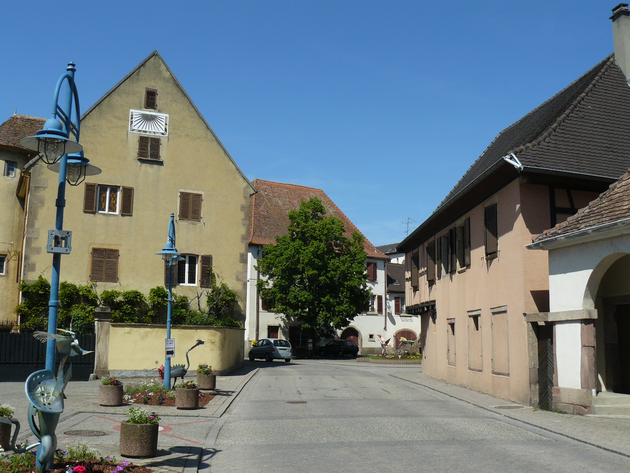 Maison avec cadran solaire